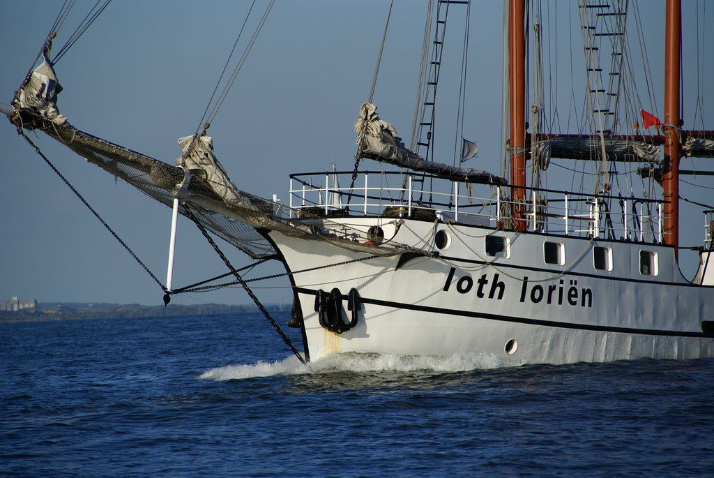 El bergantín holandés de tres palos Loth Loriën, en la Armada Rouen de 2008, cuando aún tenía aparejo de goleta.